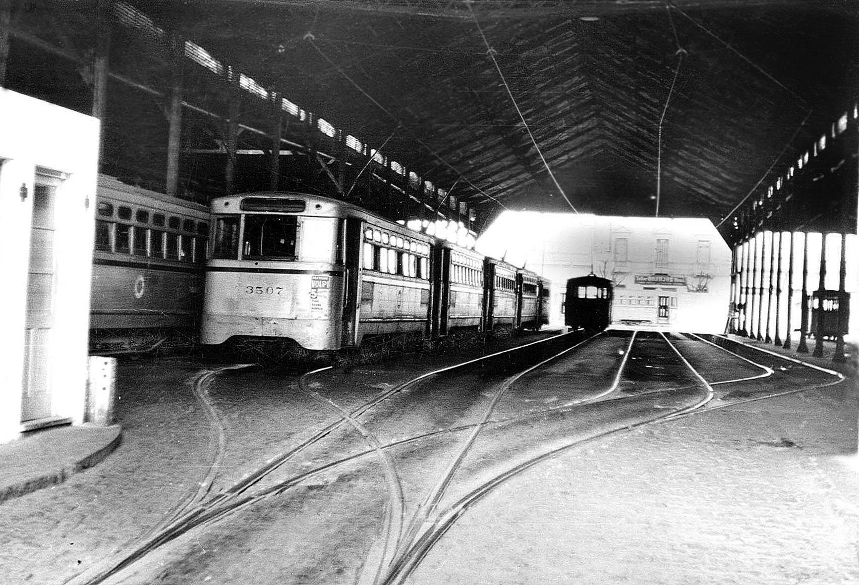 Interior de la estación Vail en sus últimos tiempos como instalación tranviaria, durante la administración de Transportes de Buenos Aires (TBA).